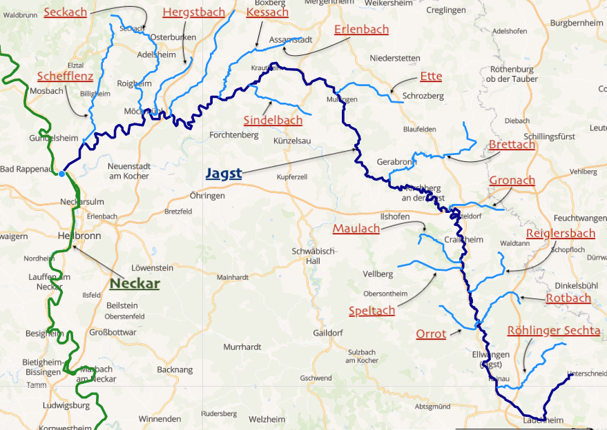 carte réalisée sur umap This map may be incomplete, and may contain errors. Don't rely solely on it for navigation.